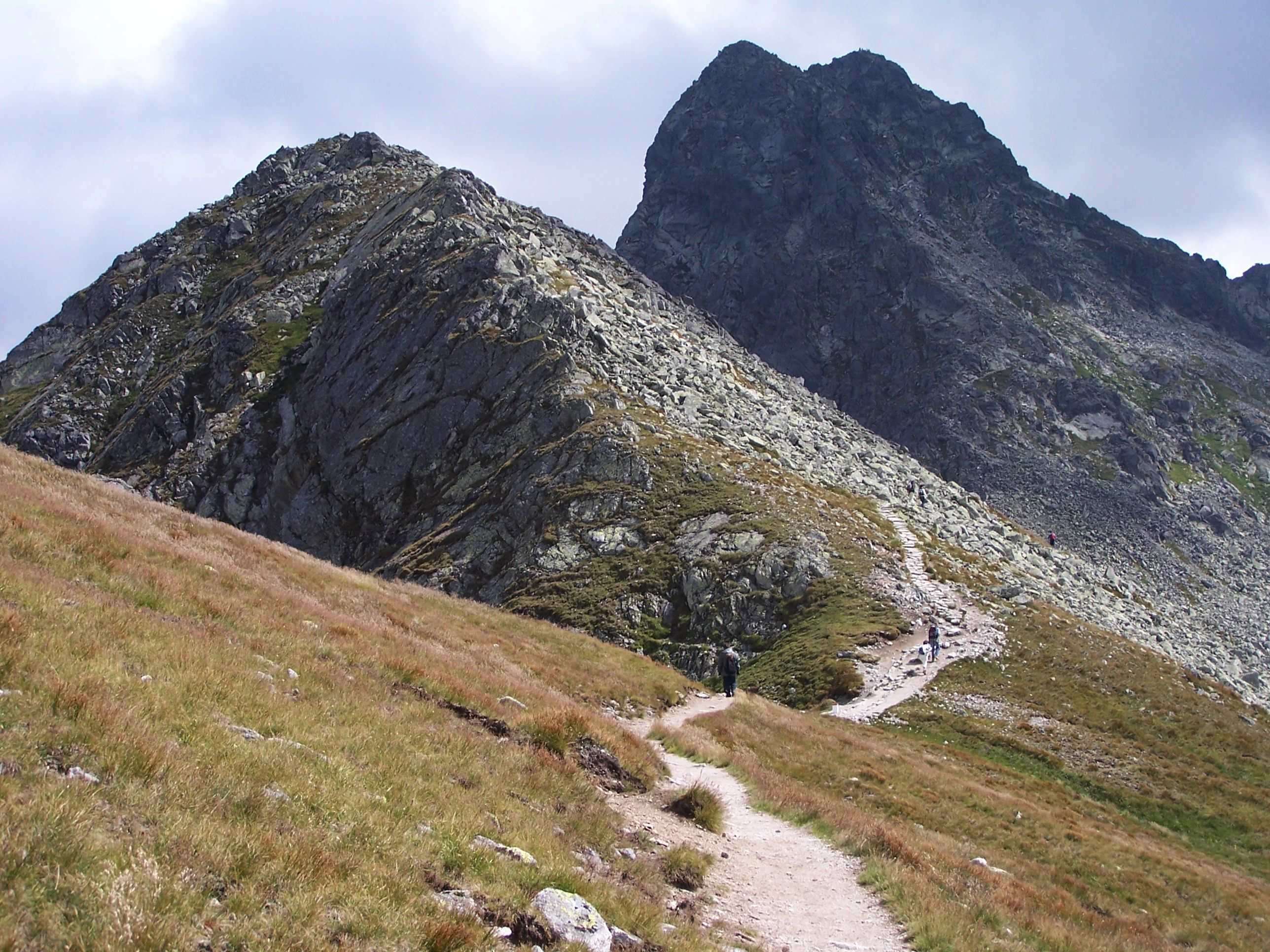 Skrajna Turnia, Pośrednia Turnia, Świnica (West Tatra Mountains)